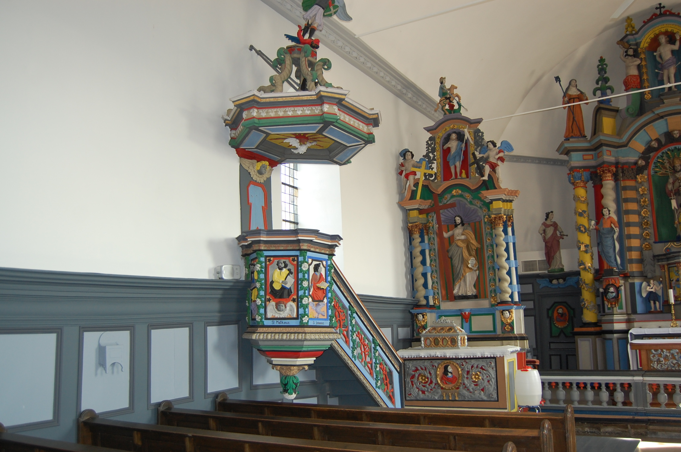 Walon: eglijhe di Bhô : pirlodje